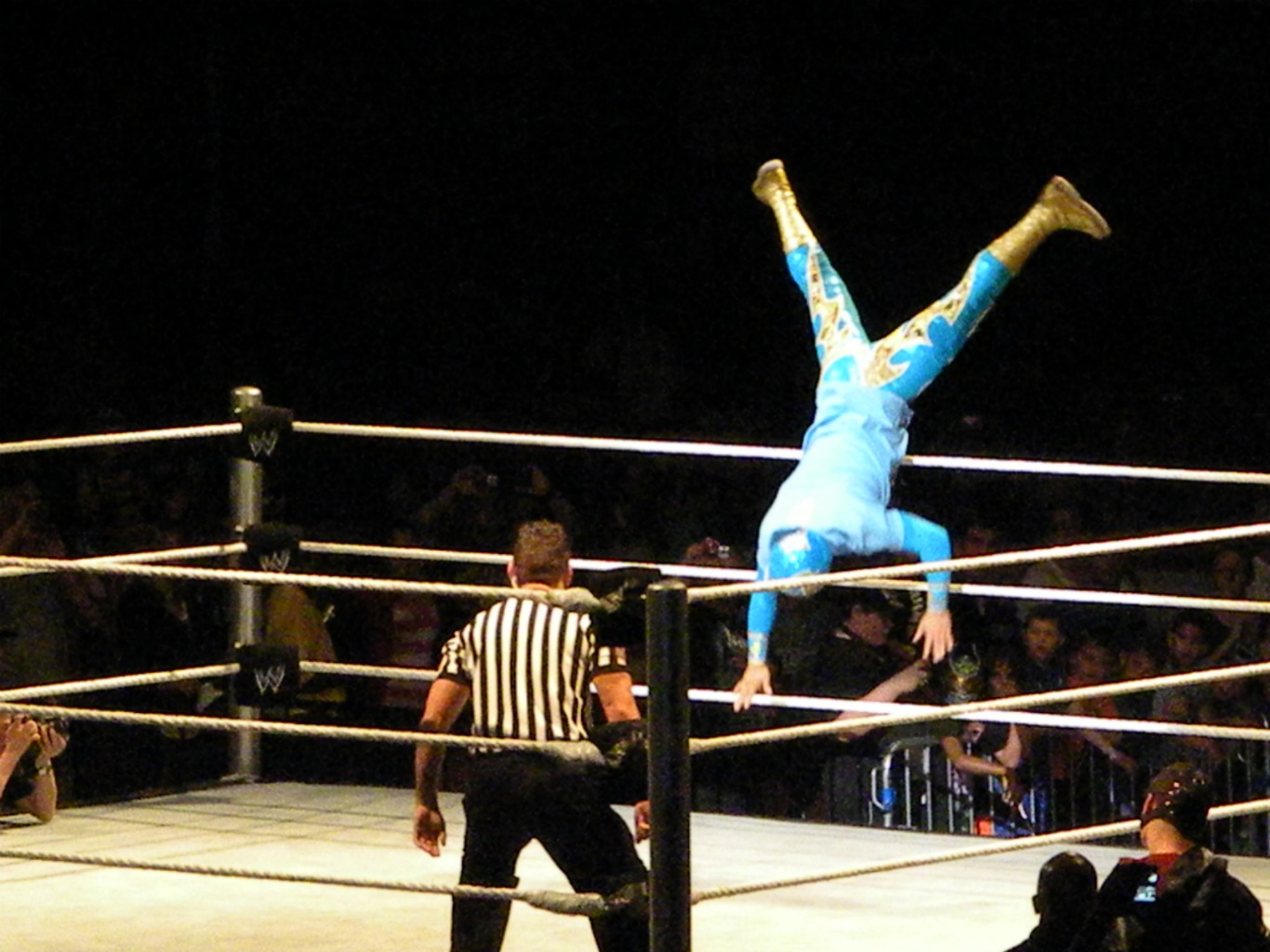 sin cara subiendo al ring de un salto